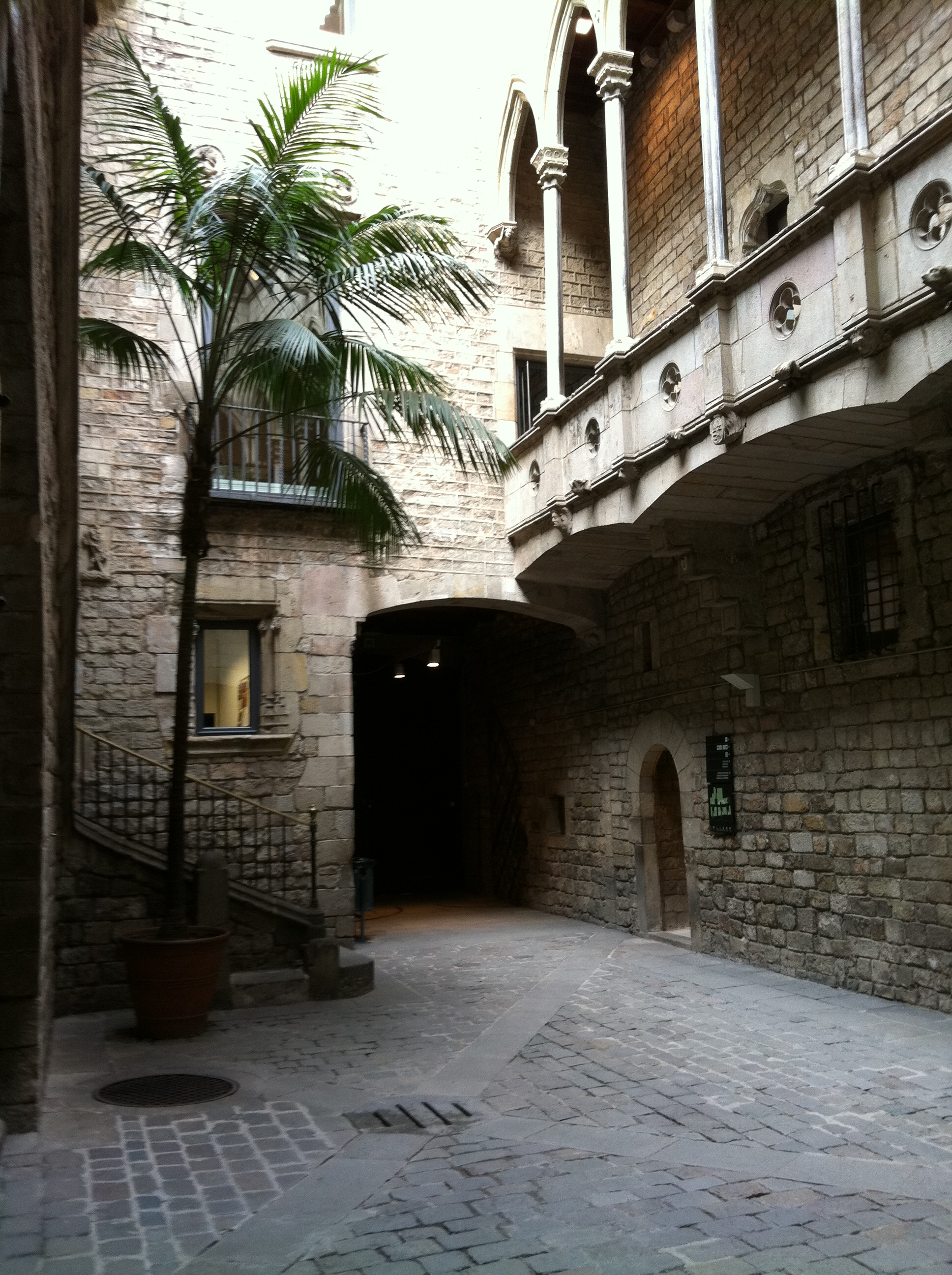 Palau Aguilar, seu del museu Picasso